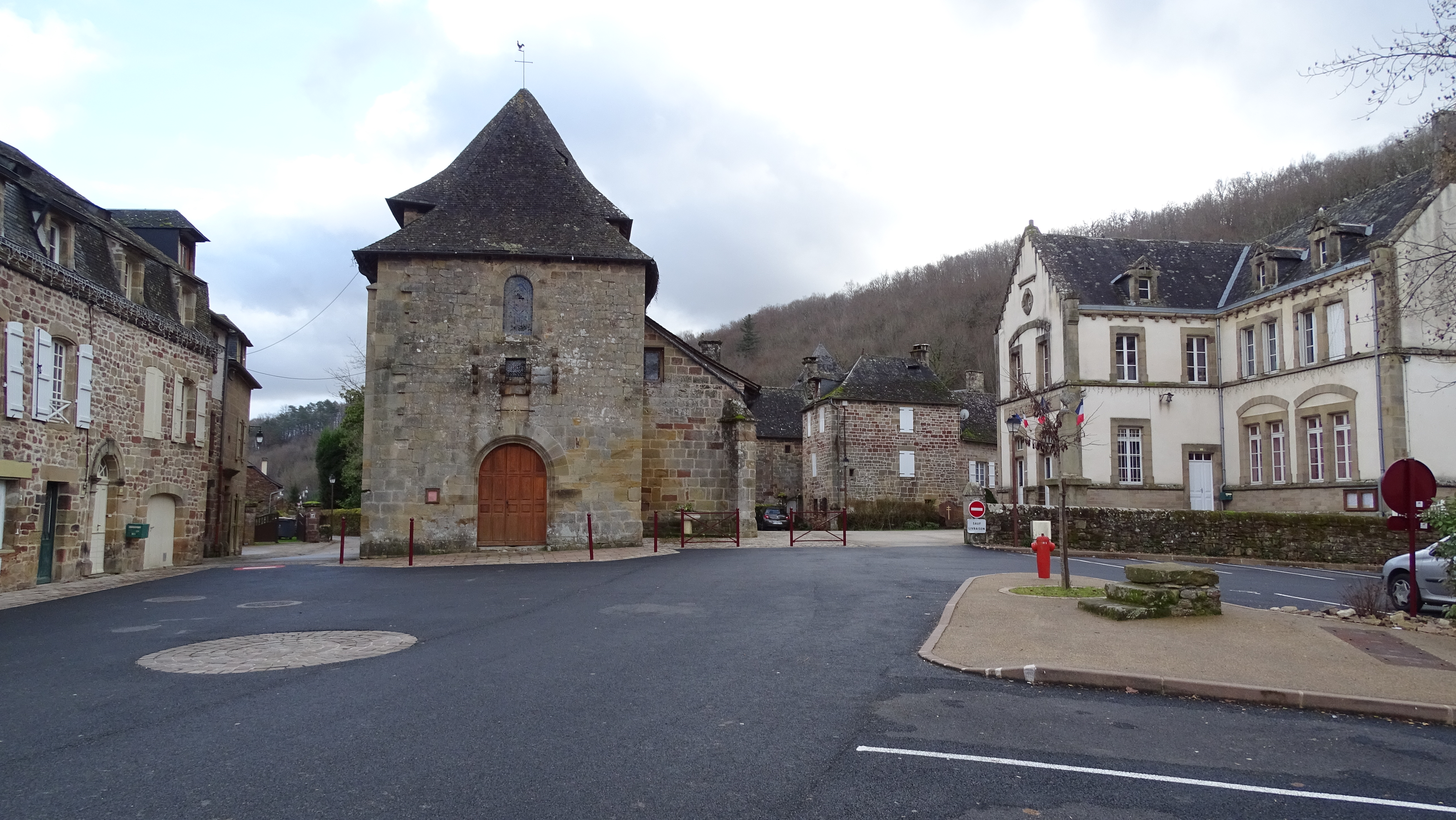 Veuillez s.v.p. donner une description du contenu du fichier que vous voudriez télécharger. Menu de navigation français Paternel 1 0 Page de discussion Préférences Bêta Liste de suivi Contributions Imports Se déconnecter Page spéciale